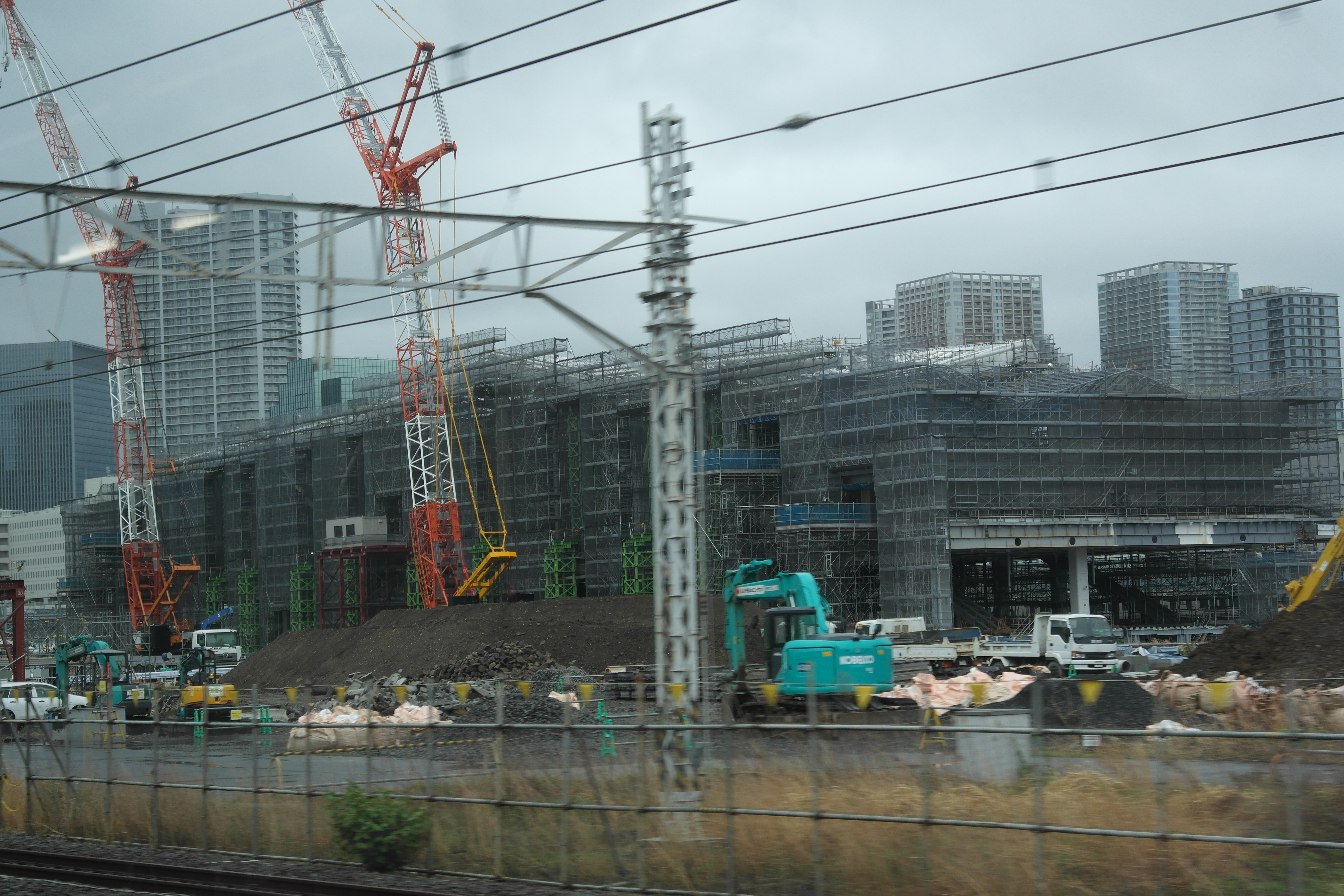 建設中の品川新駅の躯体 京浜東北線車中から撮影